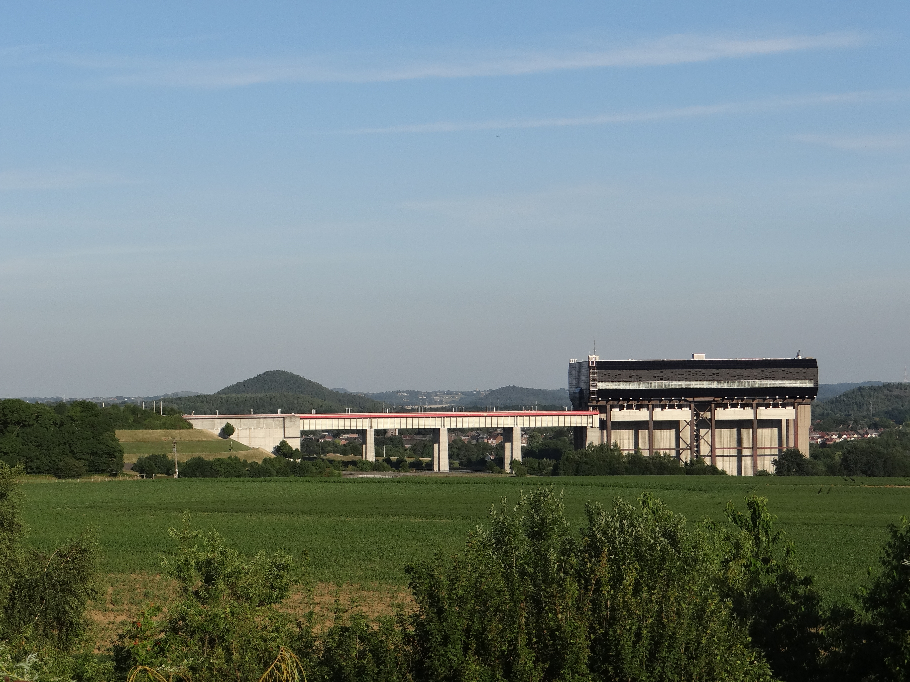 Vue sur l'ascenseur funiculaire de Strépy-Thieu, depuis le panorama de l'aire des Hauts-Bois de l'autoroute E42 (A7 en Belgique).